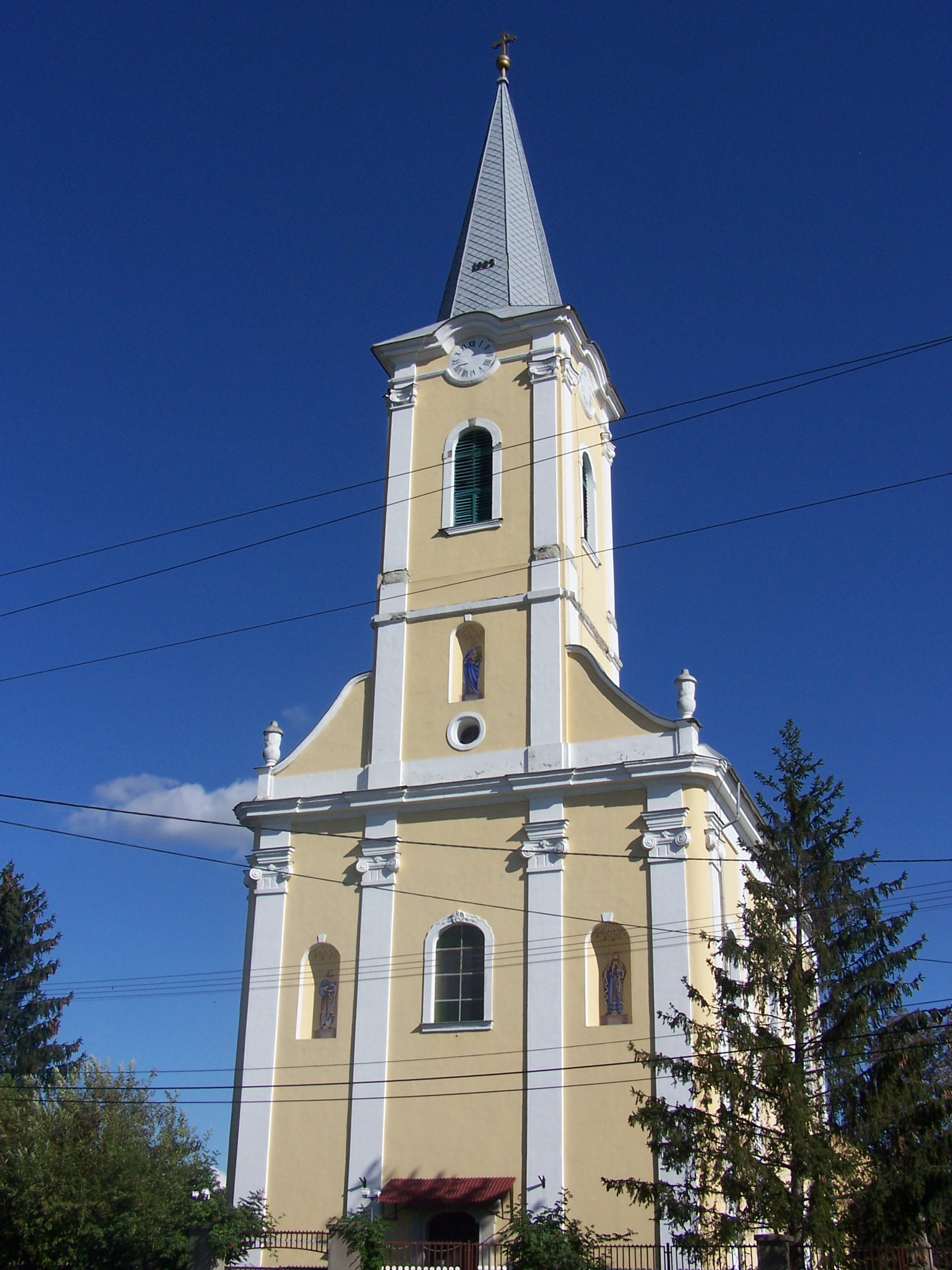 Római katolikus templom (Aszaló, Rákóczi u.) This is a photo of a monument in Hungary, Identifier: 2655